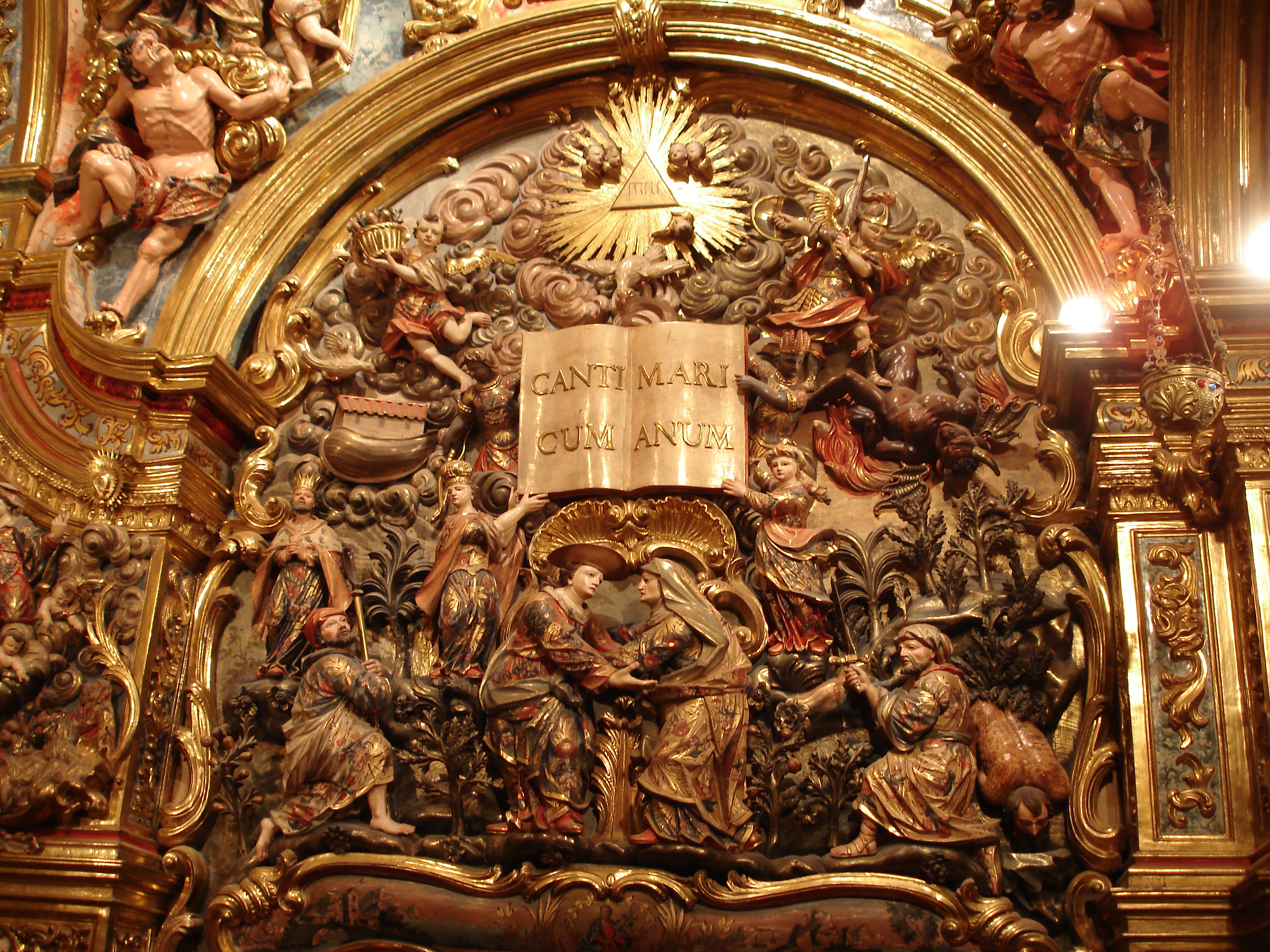 Relleu barroc, una glossa del magníficat